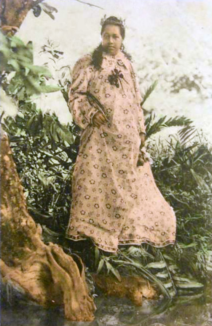 TAHITI - POLYNESIE FRANCAISE - Iles sous le vent - Tuarii, Reine de l´ile de Raiatea - Lucien Gauthier.